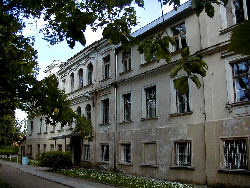 Alsviķu pils 2001-06-16